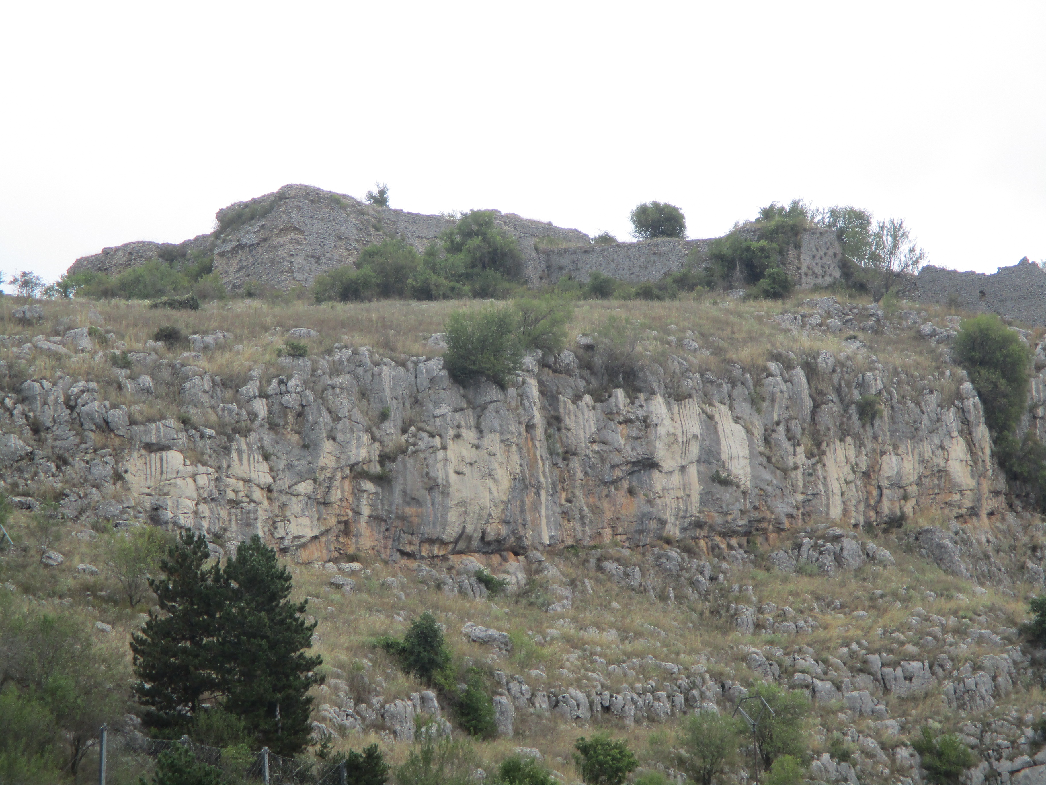 I ruderi del castello